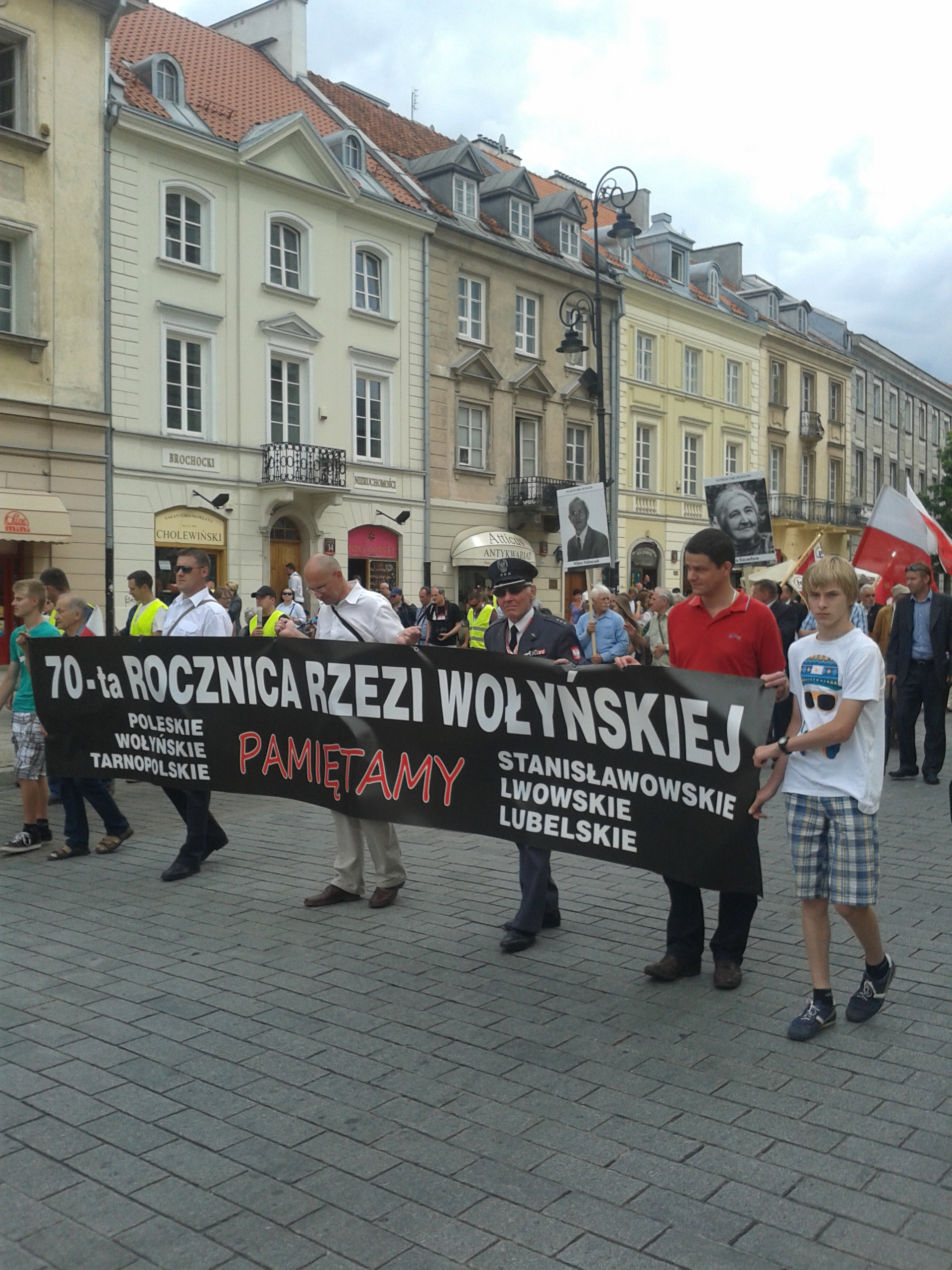 Marsz-70 rocznica